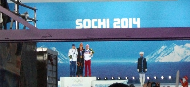 Церемония награждения победителей XXII Зимней Олимпиады в Сочи по конькобежному спорту среди женщин на дистанции 3000 м.